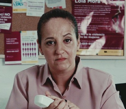 Vivian El Jaber en una campaña para combatir la violencia de género (2015).